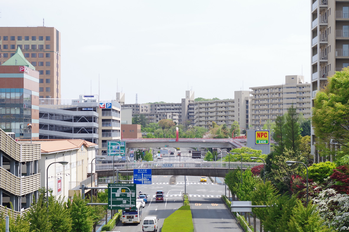 多摩ニュータウン南大沢地区の街並み160420